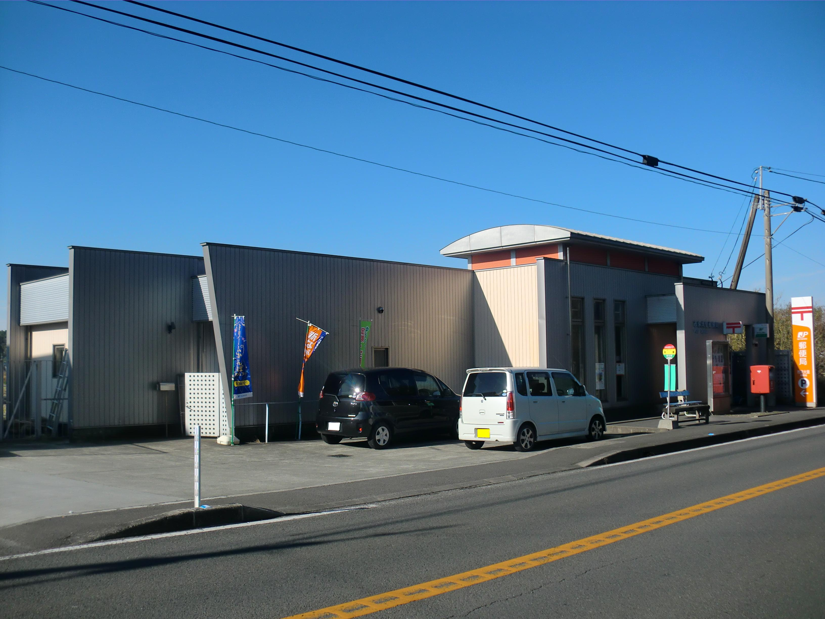 いちき串木野市にある市来大里（いちきおおさと）郵便局